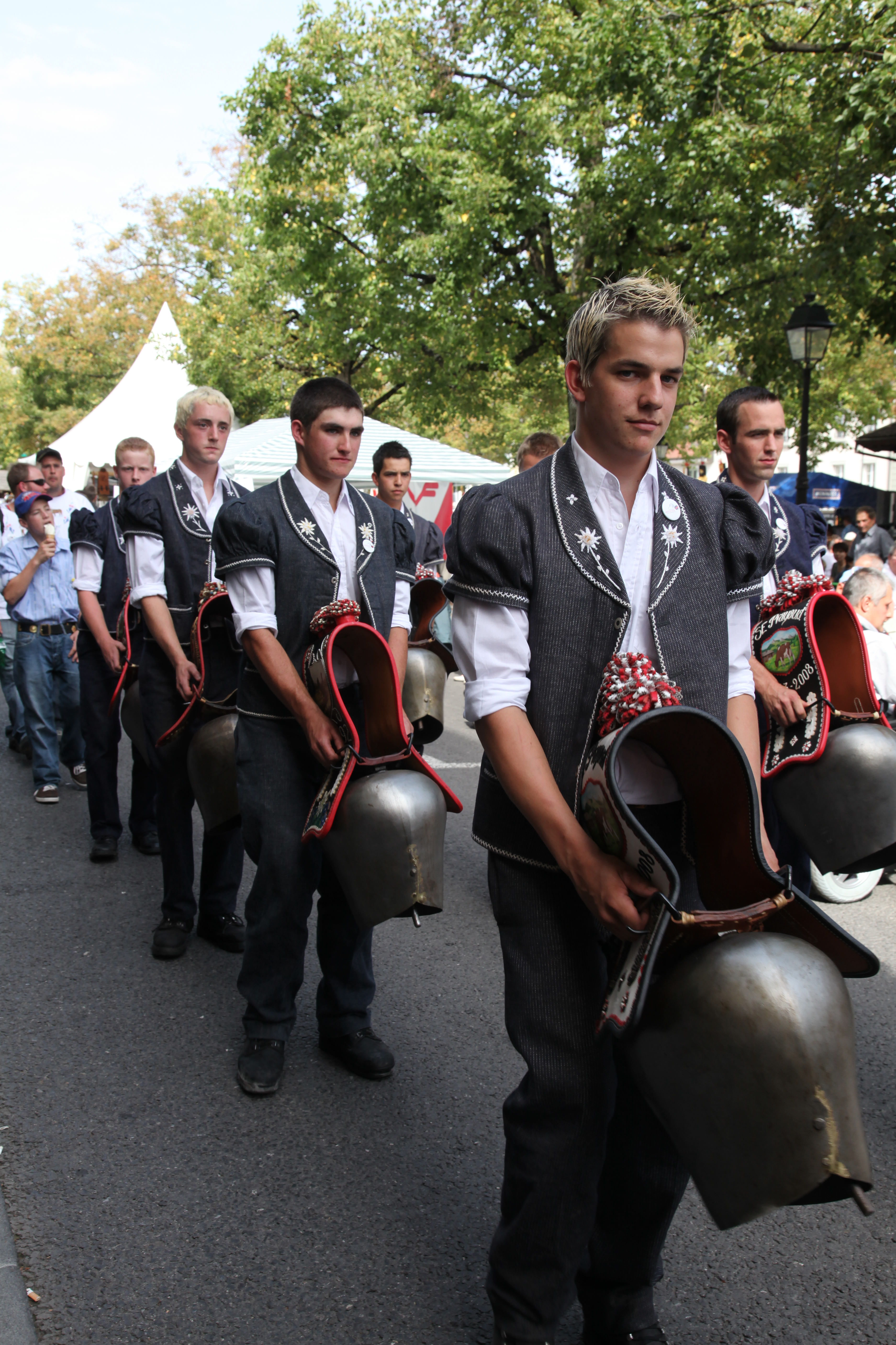 Instantanés de la Fête fédérale des sonneurs de cloches à Bulle (canton de Fribourg en Suisse). Après-midi du samedi 3 septembre 2011. Photo: Pierre Schwaller